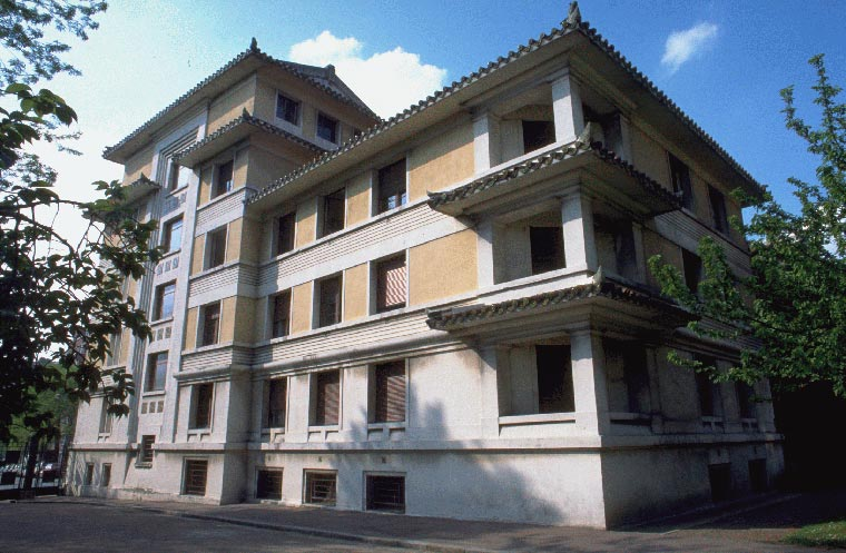 Maison des Etudiants d'Asie du Sud-Est, Cité internationale universitaire de Paris